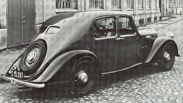 Steyr 120 Super Saloon 4 doors (1935)